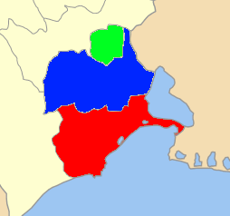 Χάρτης ενοτήτων του Δήμου Αβδήρων